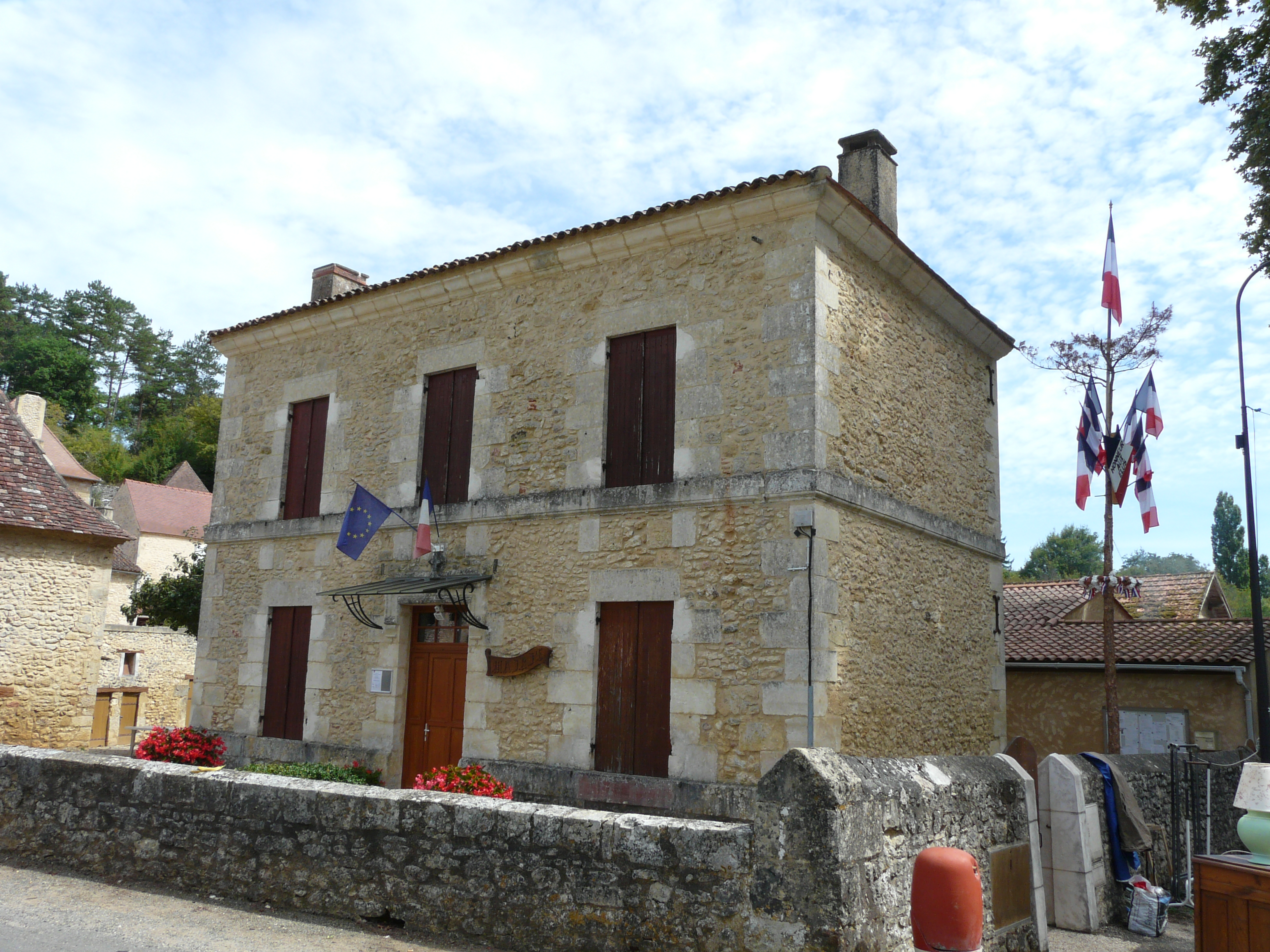 La mairie de Saint-Marcel-du-Périgord, Dordogne, France.